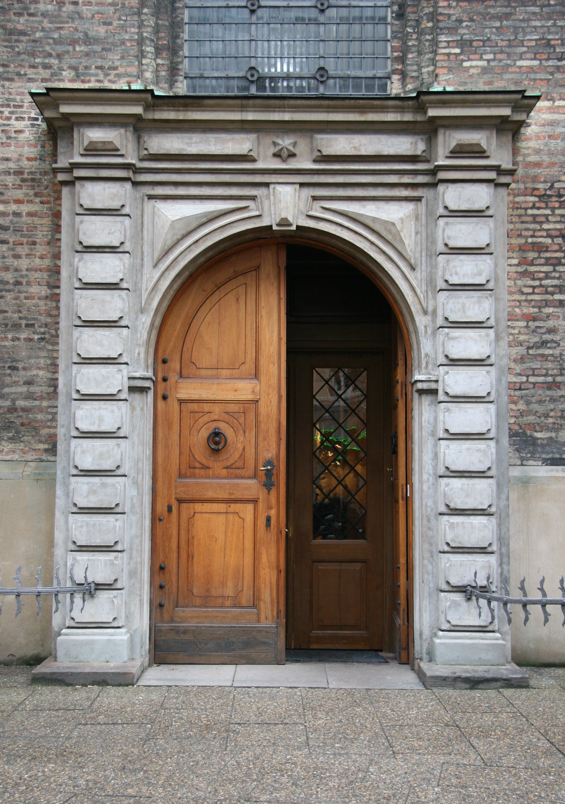 Trinitatis Kirke, Copenhagen, Denmark. Nordvestportal.